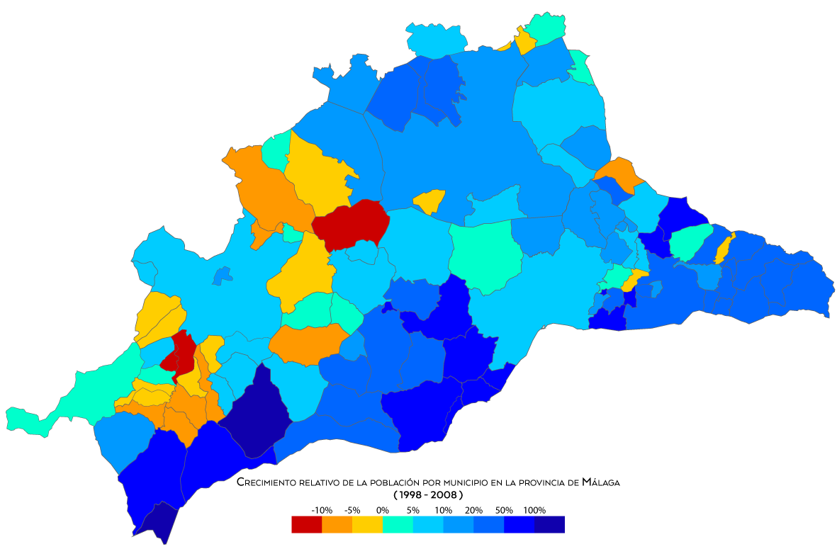 Crecimiento de la población por municipios en la provincia de Málaga entre los años 1998 y 2008